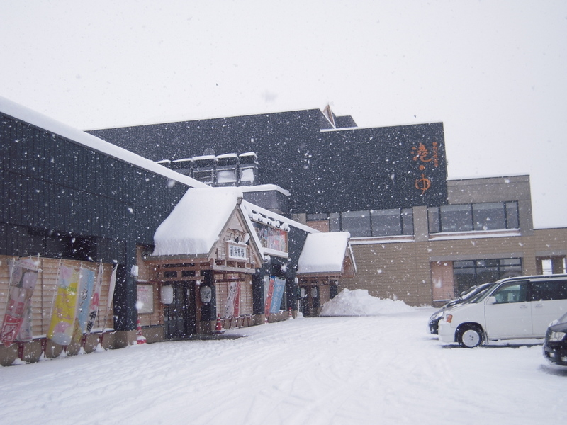 稚内副港市場外観